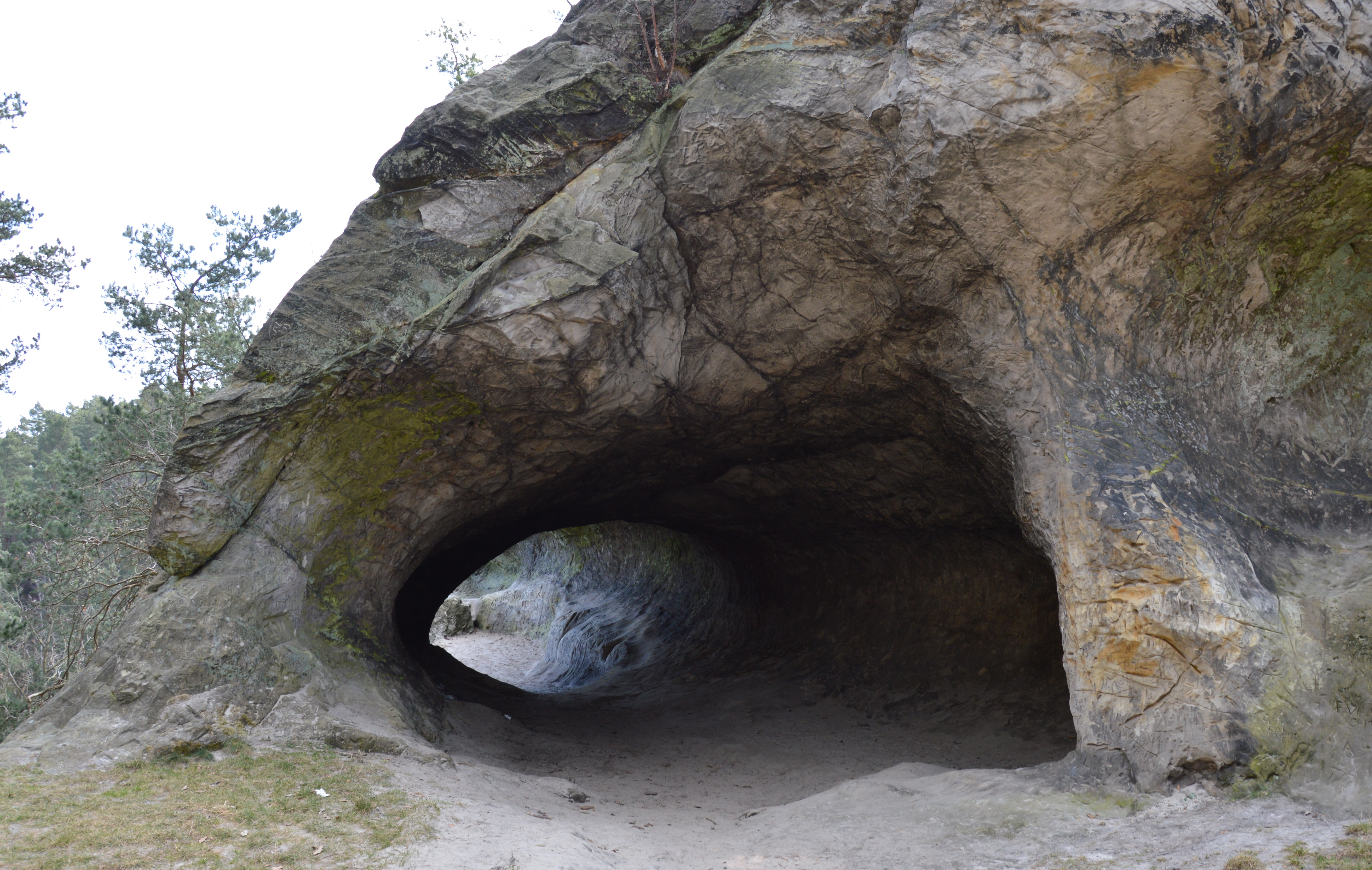 Teufelsloch Blick hinein